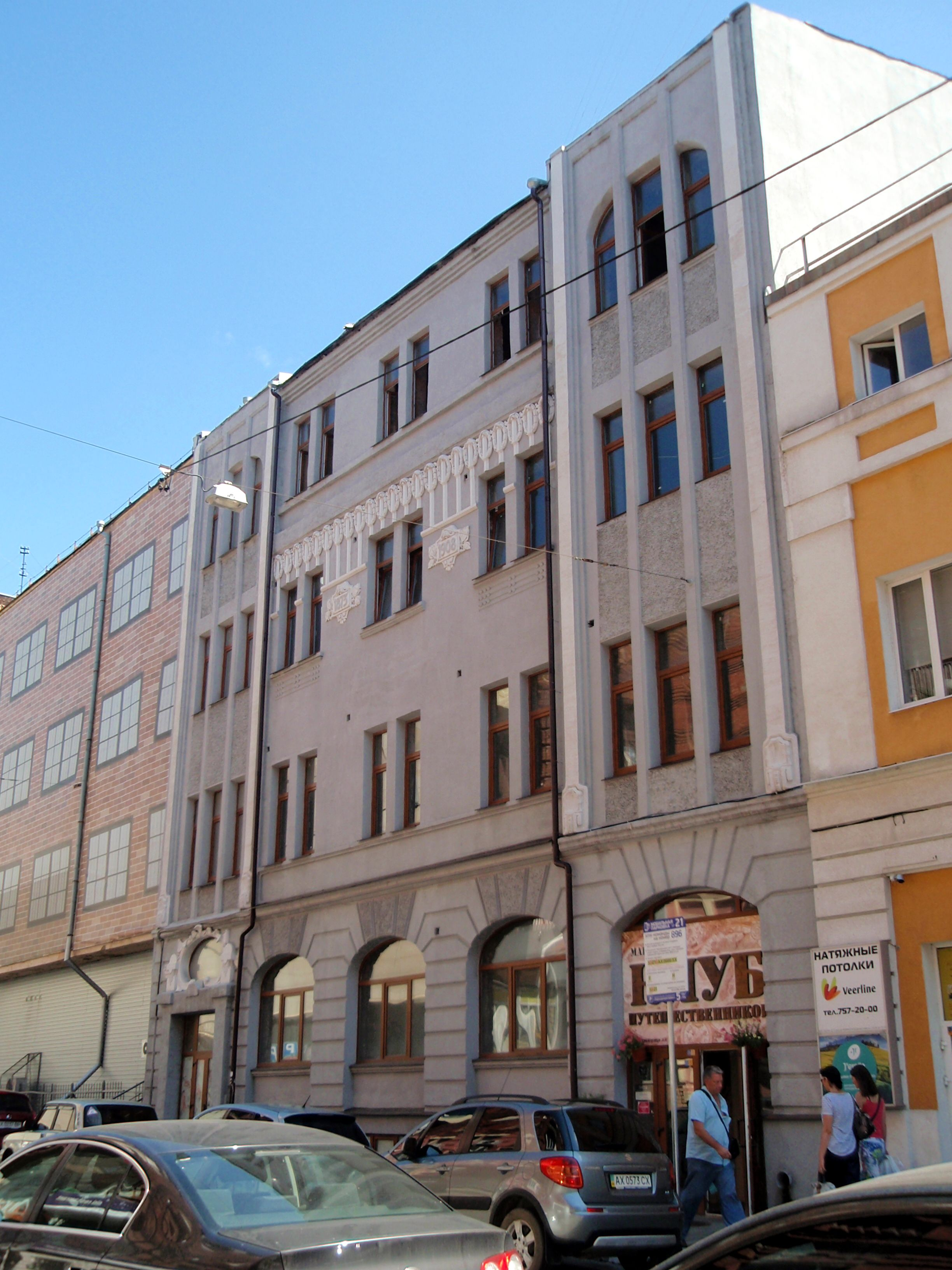 Типографія, Харків, вул. Донця-Захаржевського, 6/8